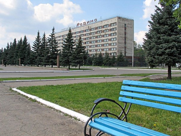 Вигляд готелю "Родина"